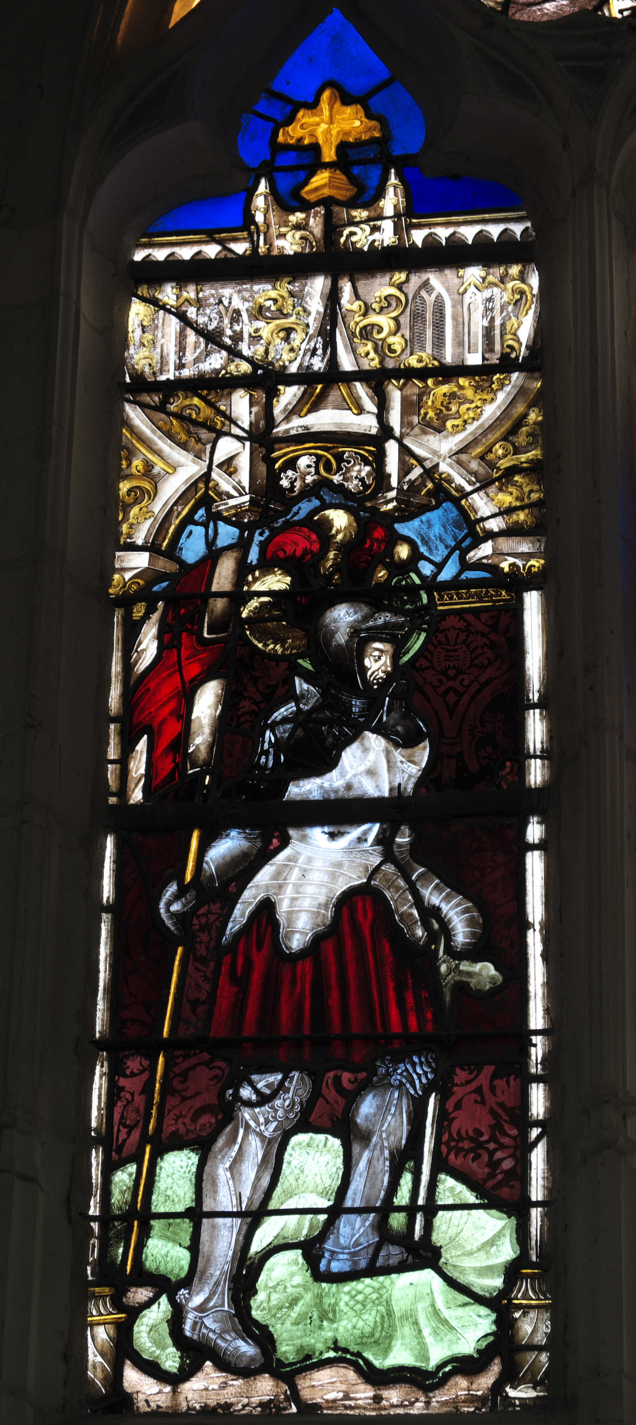 Bleiglasfenster (Baie 18) in der Basilika Saint-Nicolas in Saint-Nicolas-de-Port im Département Meurthe-et-Moselle (Lothringen/Frankreich), mit Fragmenten aus der Zeit um 1510—1520 von Jacot de Toul; Darstellung (Ausschnitt): Hl. Georg (links), Gesicht des Heiligen wird Valentin Bousch zugeschrieben